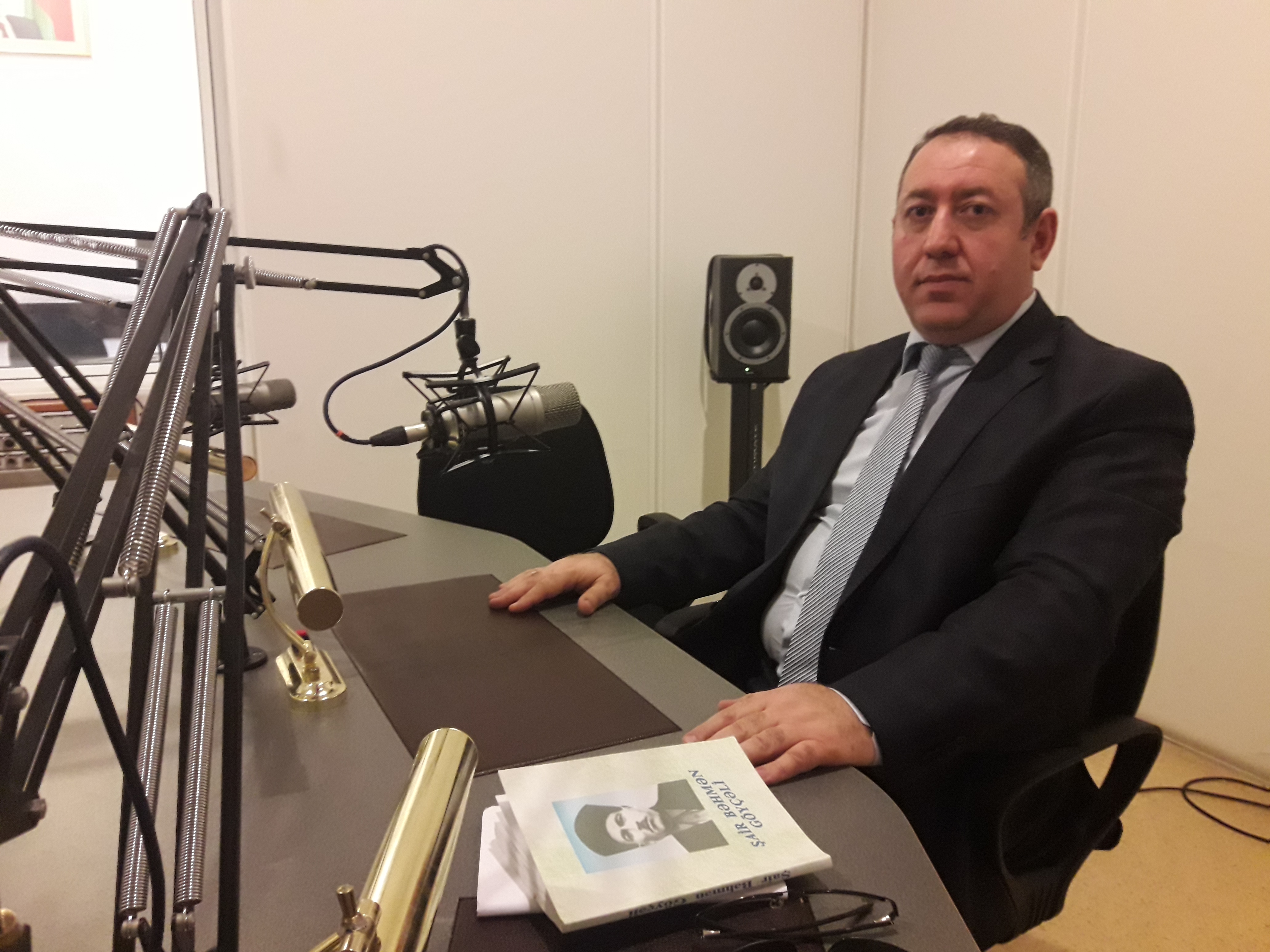 Abbas həkim radioda